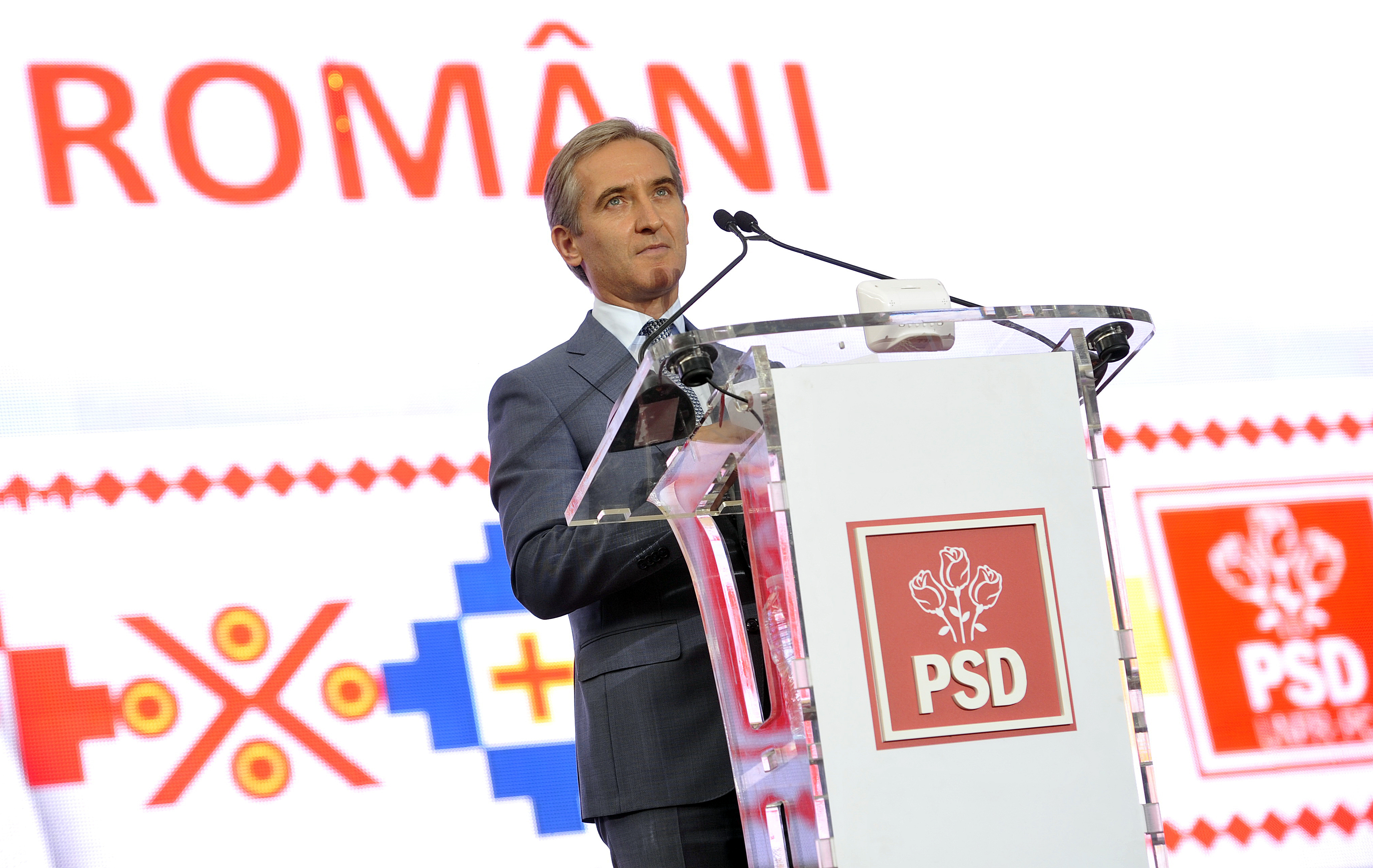 Lansarea candidaturii lui Victor Ponta la alegerile prezidentiale din 2014 - 20.09 (22)